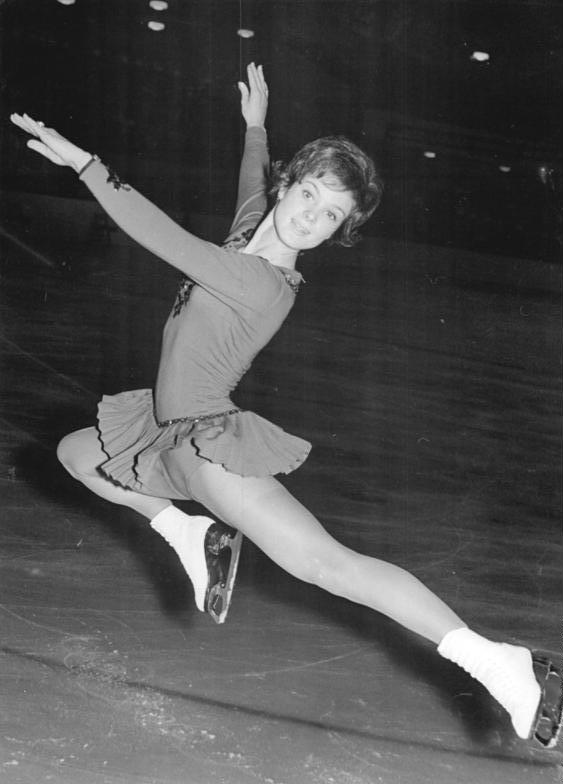 Uschi Kessler Zentralbild 13.12.1963 Eiskunstlauf, Olympia-Ausscheidungen Ausgezeichnete Leistungen gab es bei den Ausscheidungskämpfen der Eiskunstläufer der DDR und Westdeutschlands am 12.12.1963 in der Berliner Werner-Seelenbinder-Halle vor 4500 Zuschauern. Nach der Pflicht am Vormittag wurde am Abend der erste Durchgang der Olympia-Ausscheidungen um die freien vier Plätze für Innsbruck mit dem Kürprogramm beendet. Die Würfel fallen dann endgültig am 19.12.1963 im Westberliner Sportpalast. UBz: Bei den Frauen dominierten die westdeutschen Teilnehmerinnen recht eindeuetig. Über einen noch kaum einholbaren Vorsprung verfügt Uschi Kessler (unser Bild) mit Platzziffer 5 und 205,63 Punkten. -Kohls